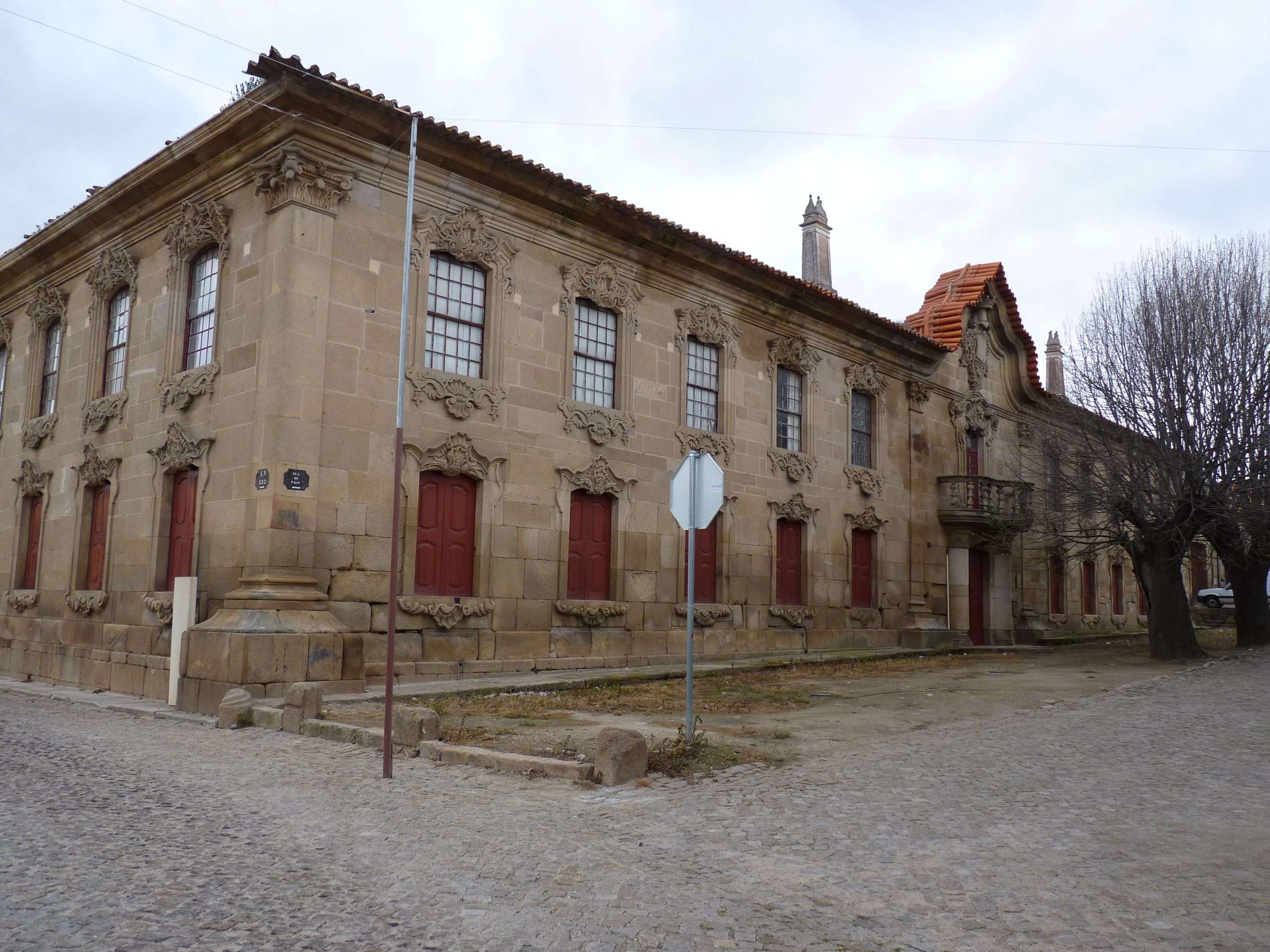 Solar do Visconde de Almendra This file was uploaded for Wiki Loves Monuments in Portugal with the unique identifier 73324.